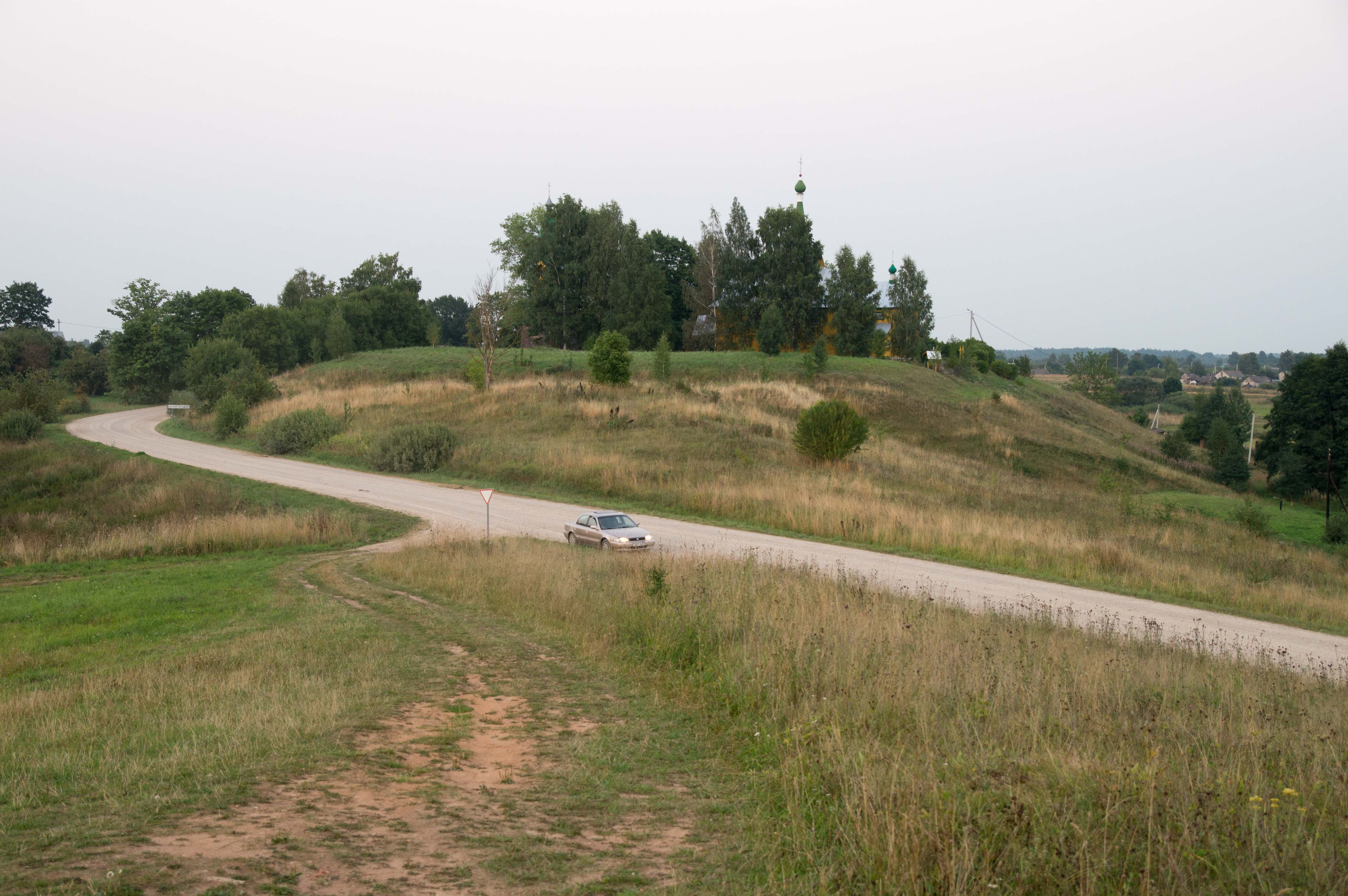 Гарадзішча (Асінагарадок) This is a photo of Belarusian heritage monument. Reference number: 213Г000582 ( WLM)